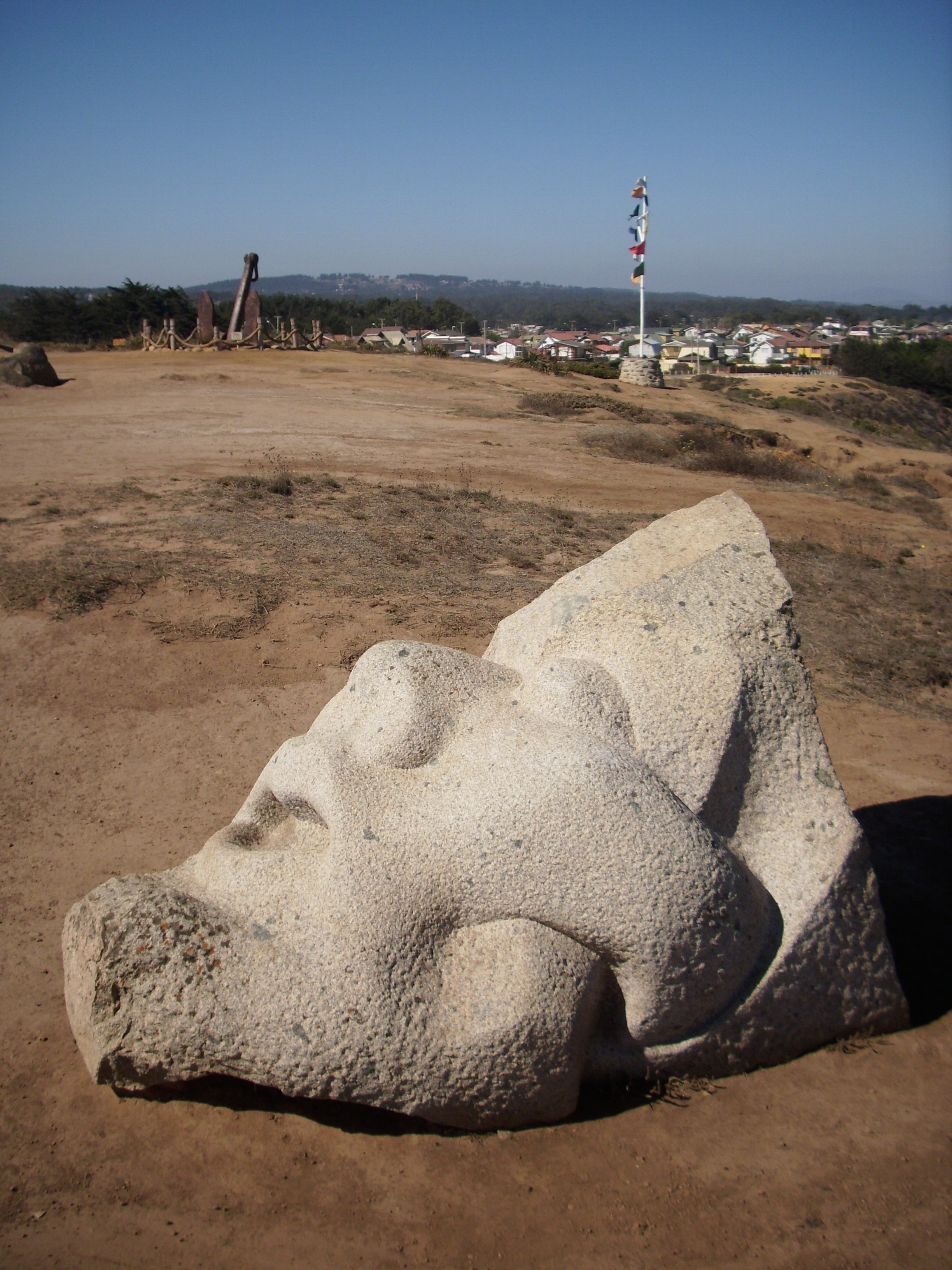 Una escultura de piedra tallada en los terrenos de Cantalao, proyecto artístico y cultural impulsado en Isla Negra por el poeta chileno Pablo Neruda. Fotografía del 17 de abril de 2012.